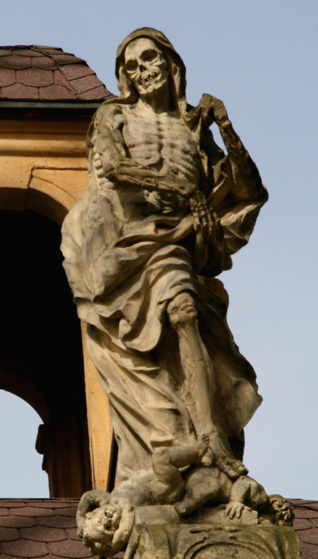 Darstellung des Gevatters Tod auf dem Dach des Grufthauses Nr. 2 auf dem Gnadenkirchhof in Jelenia Góra (Hirschberg) (um 1716)